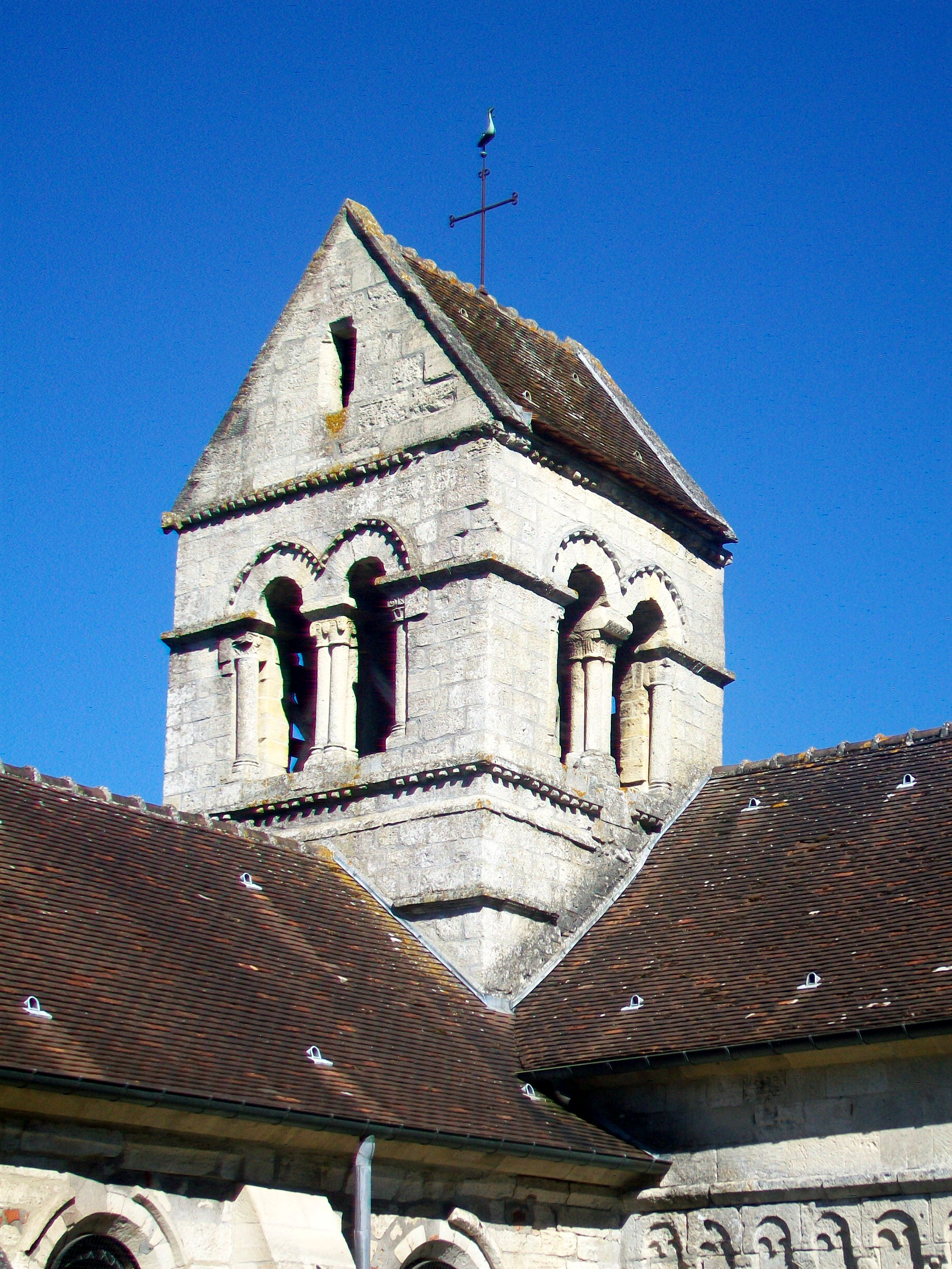 Le clocher sur la croisée du transept.